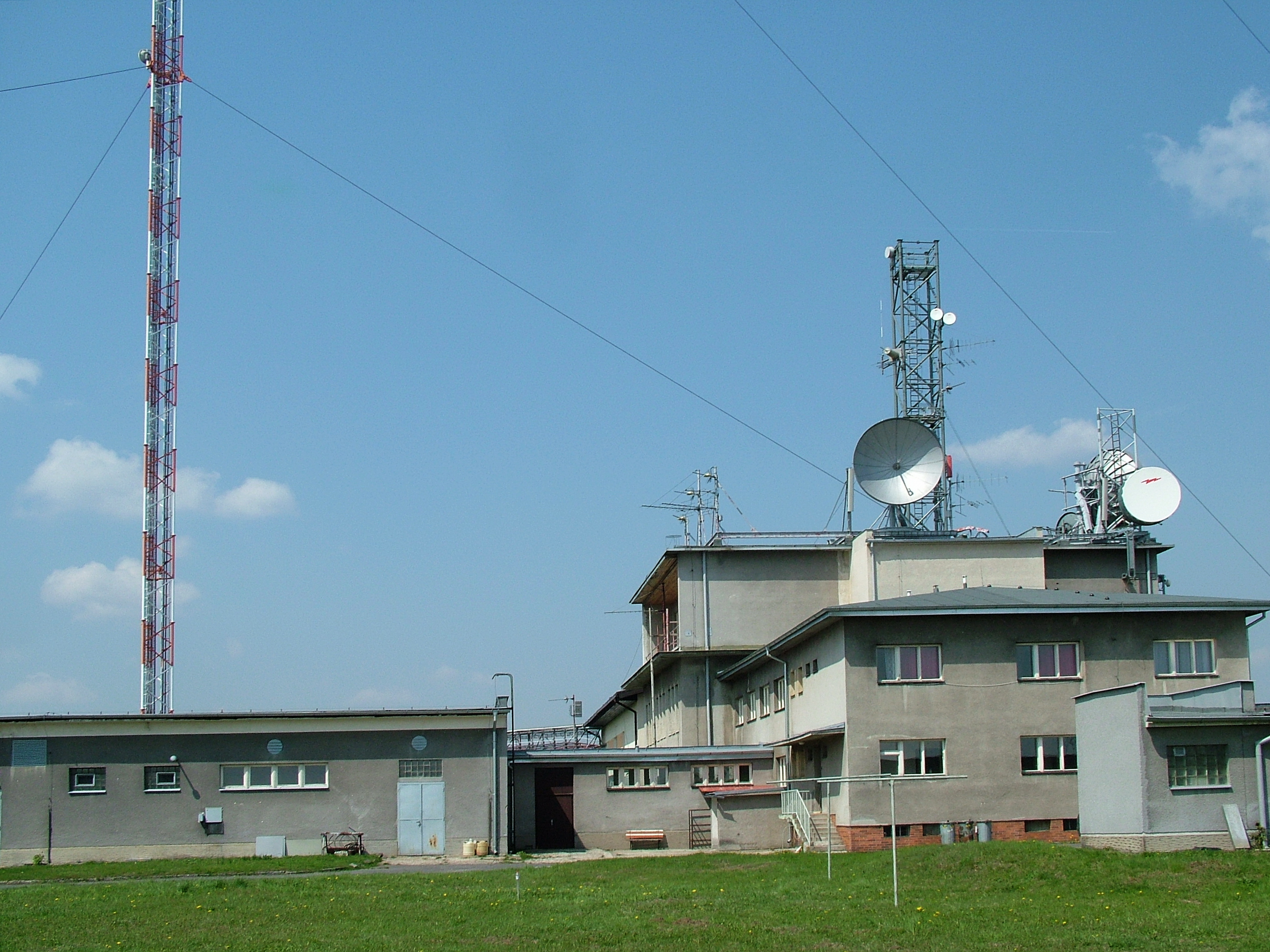 Televizní vysílač Krašov, foto: Vít Švajcr